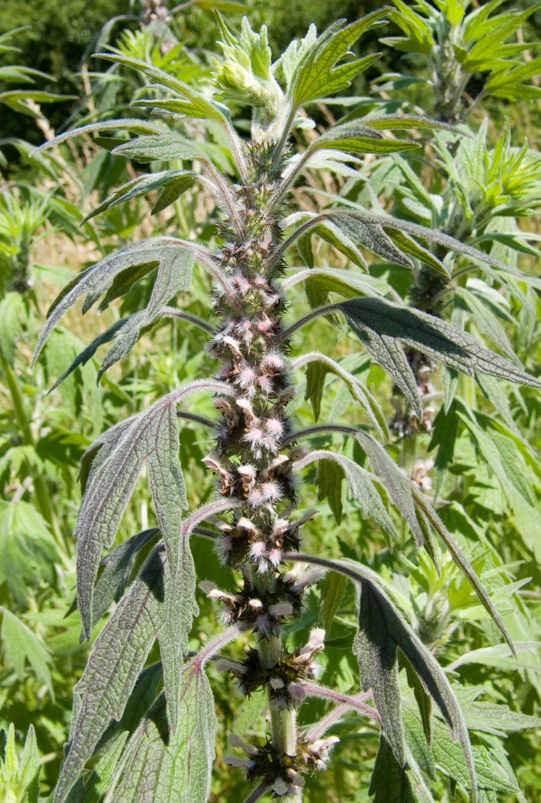 Leonurus quinquelobatus (Syn. Leonurus cardiaca subsp. villosus), Tauberland, Germany